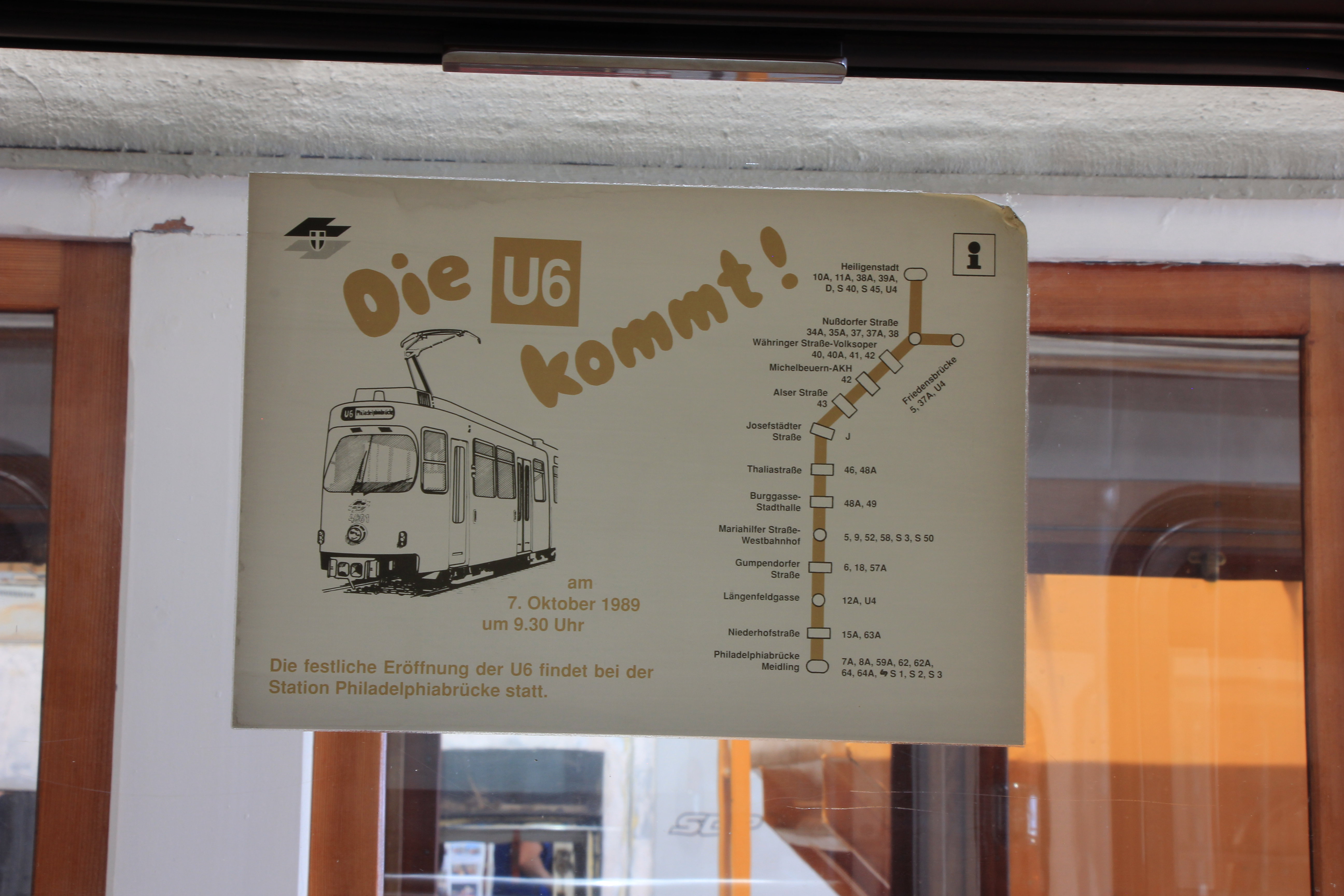 Museumsdepot des Wiener Tramwaymuseums in Traiskirchen Dieses Bild wurde anlässlich des österreichischen Tags des Denkmals 2016 in Niederösterreich eingereicht.